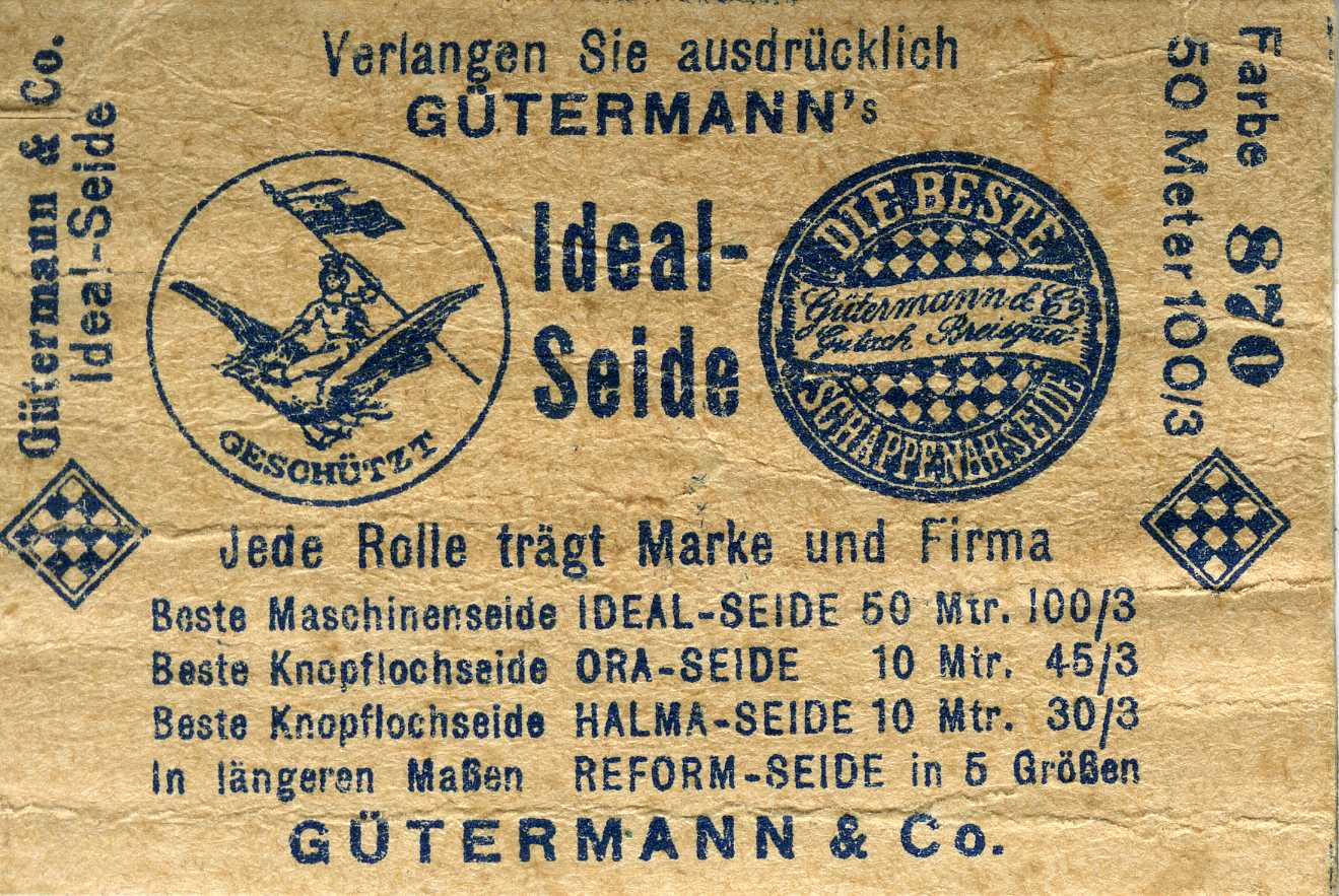 Aufgewickelte Papprolle der "Gütermann's Ideal-Seide"